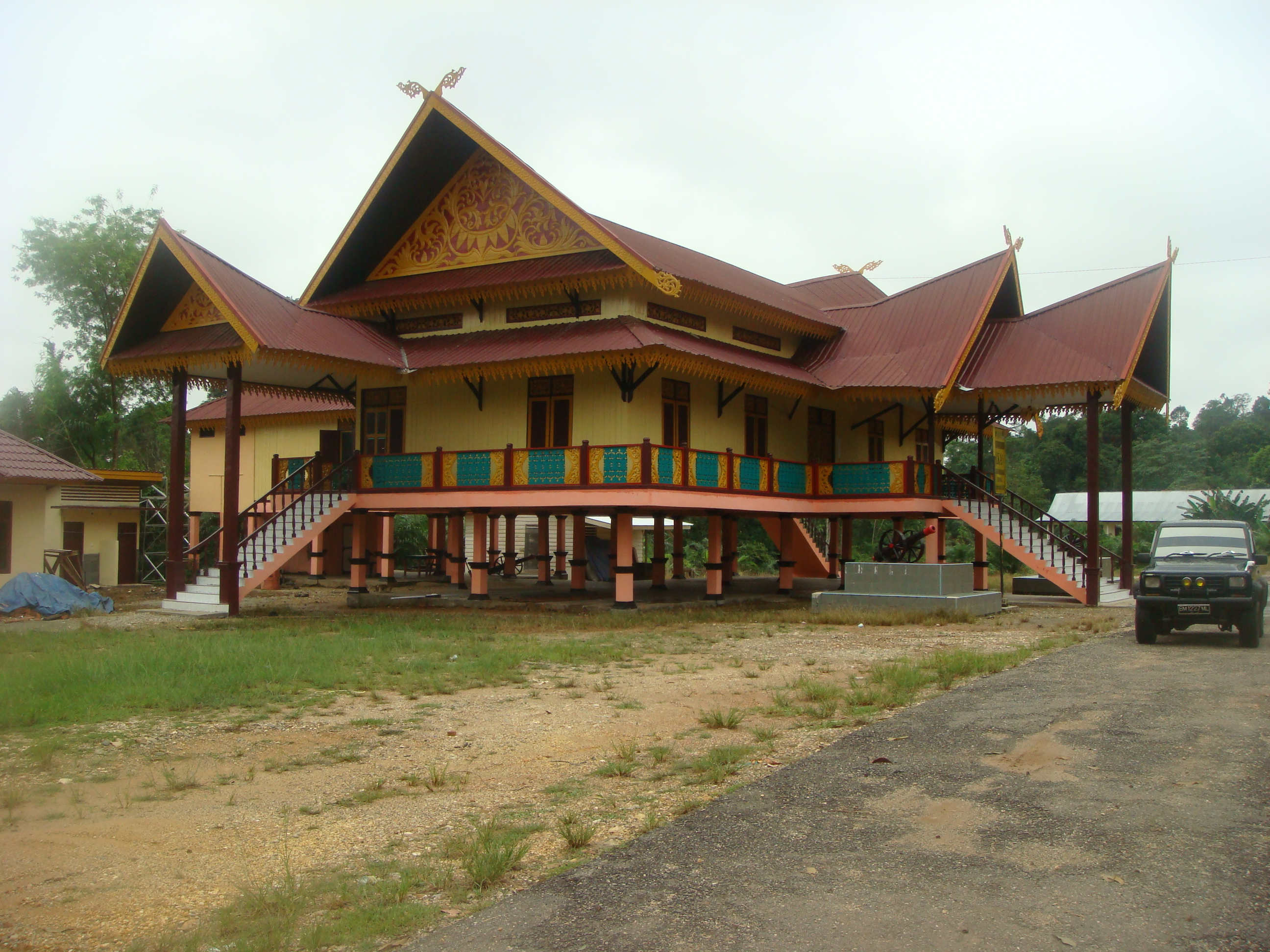 Balai Adat Tambusai Rokan Hulu